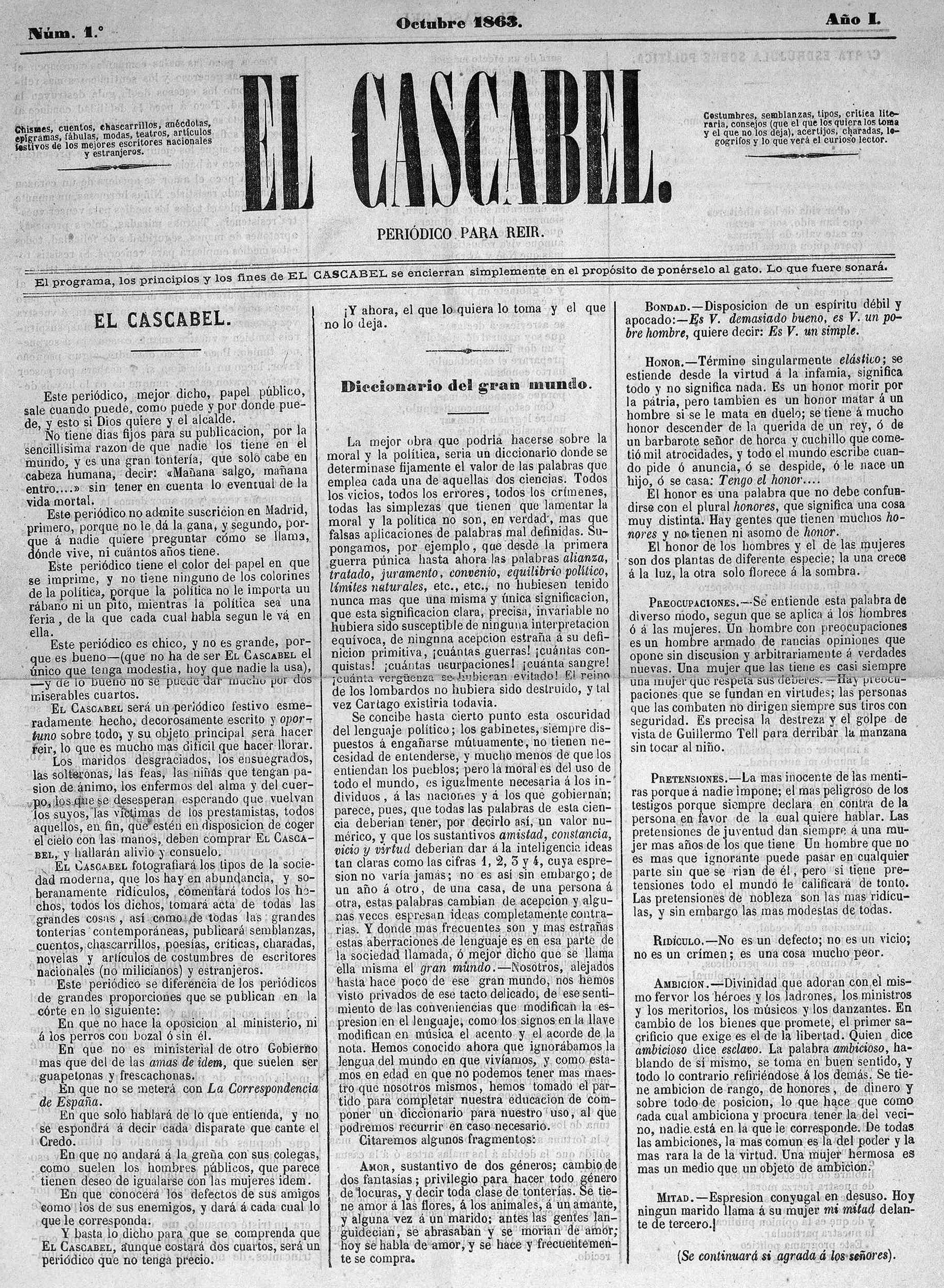 Portada del primer número de El Cascabel, octubre de 1863.